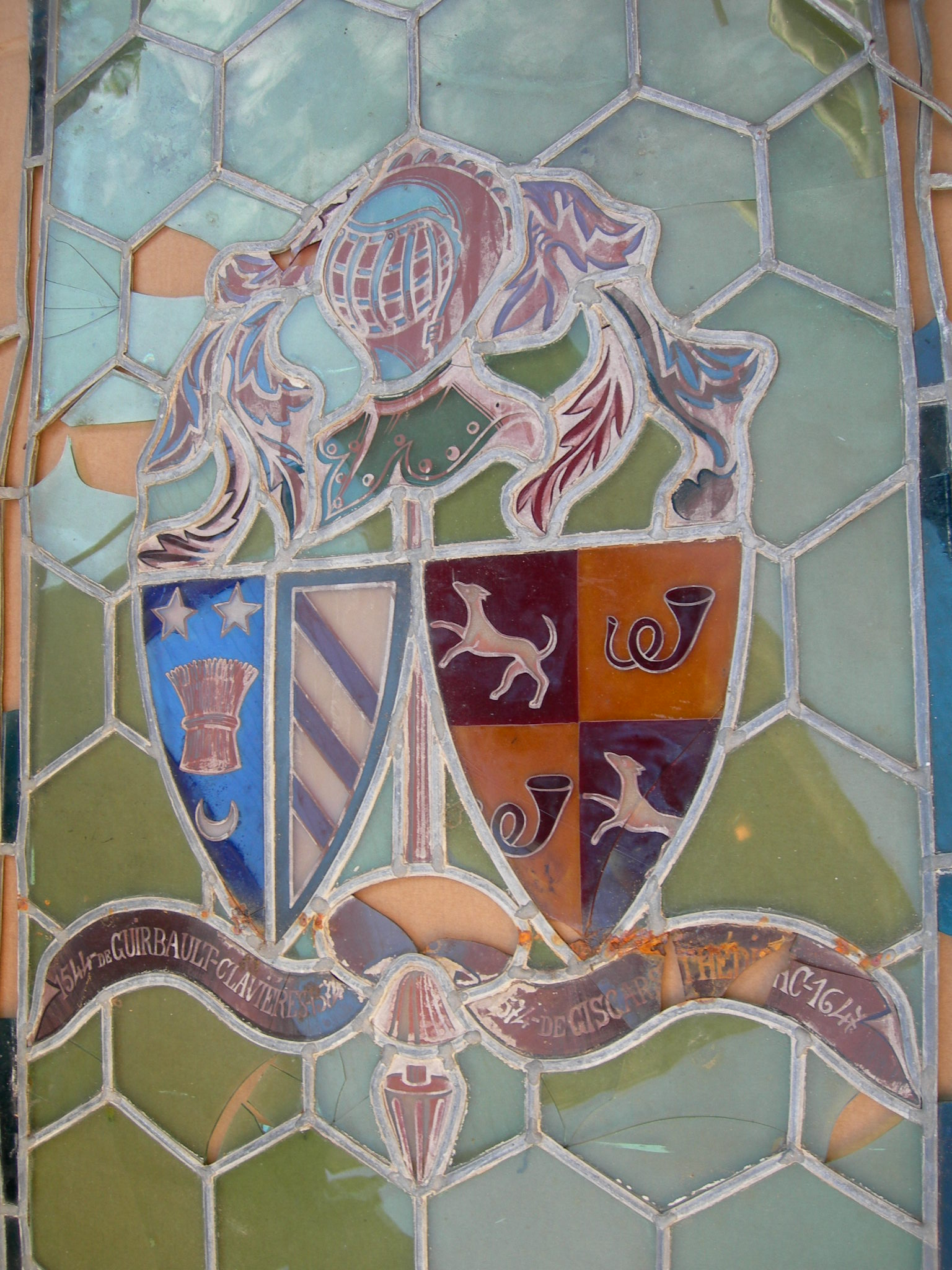 Armoiries figurant sur un vitrail provenant fort probablement du Château de Clavières-Ayrens,aujourd'hui totalement disparu.